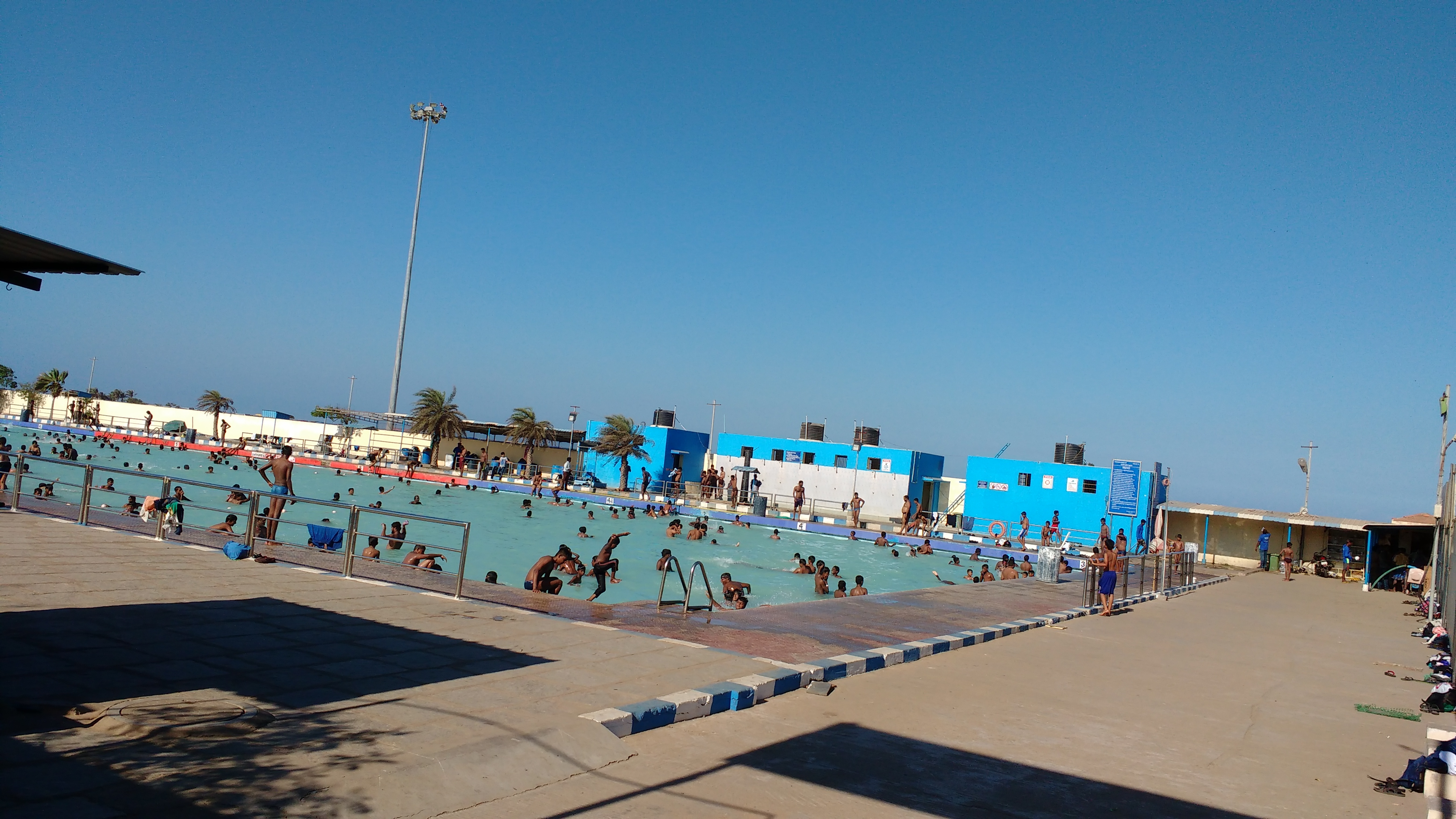 Children at Marins Swimming Pool